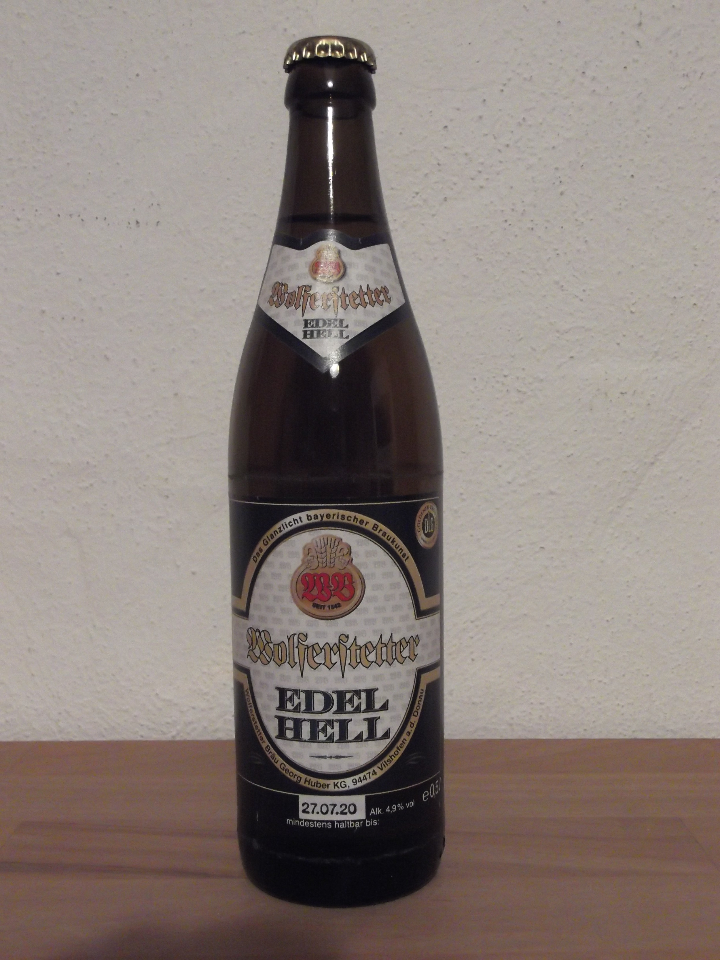 Flaschenabfüllung 0,5l